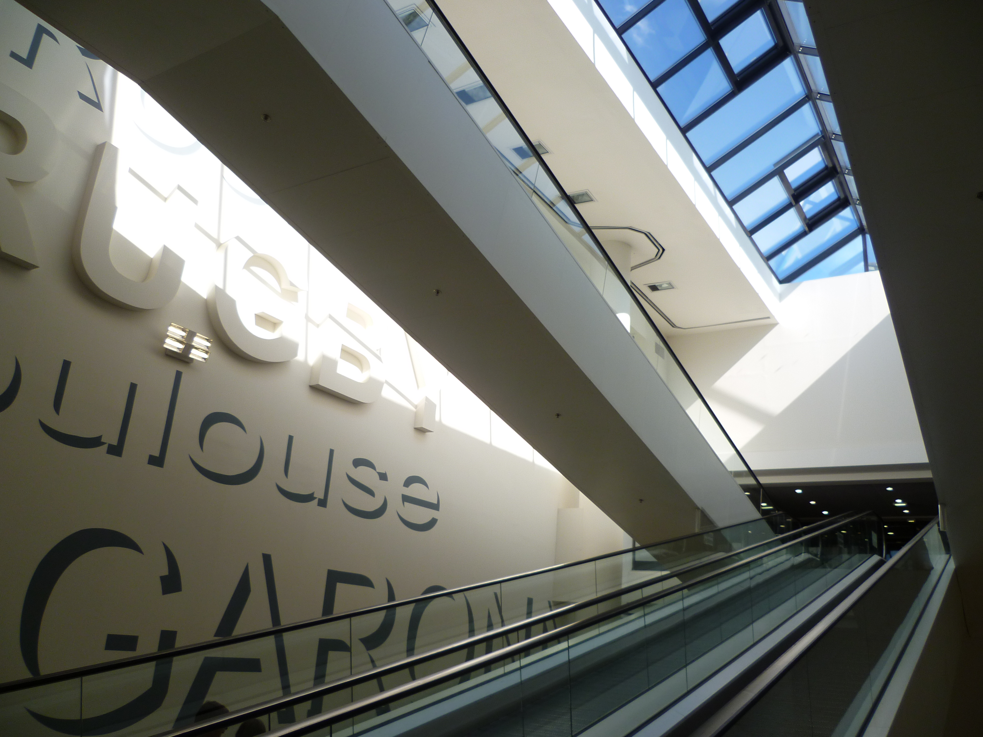 Tapis roulants au centre commercial de Roques (Haute-Garonne, France).